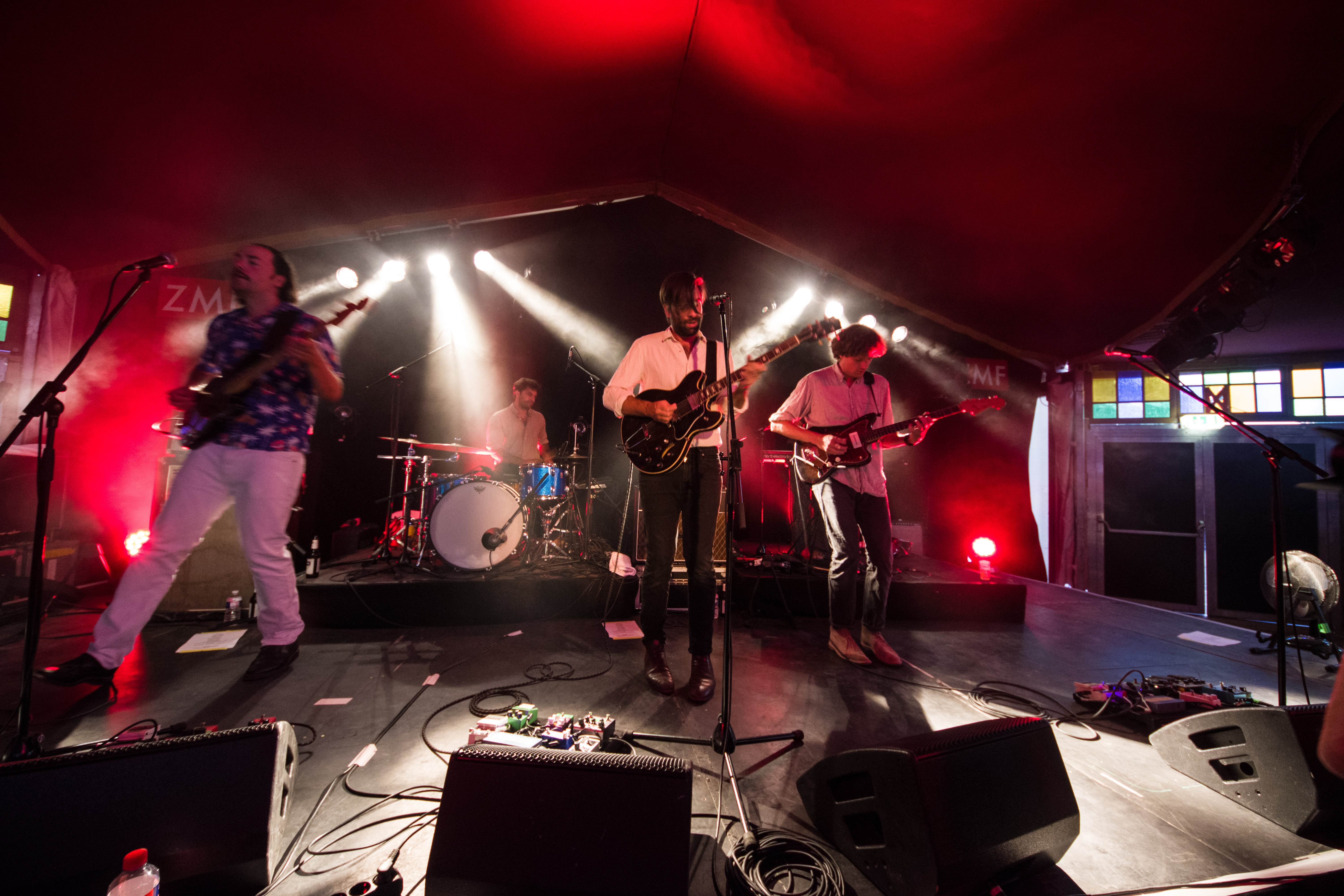 Das Zelt-Musik-Festival 2018 in Freiburg im Breisgau 18.07.2018 Shout Out Louds